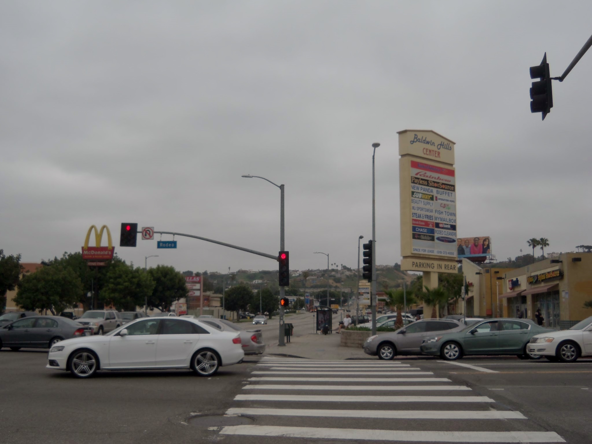 Baldwin Hills Center